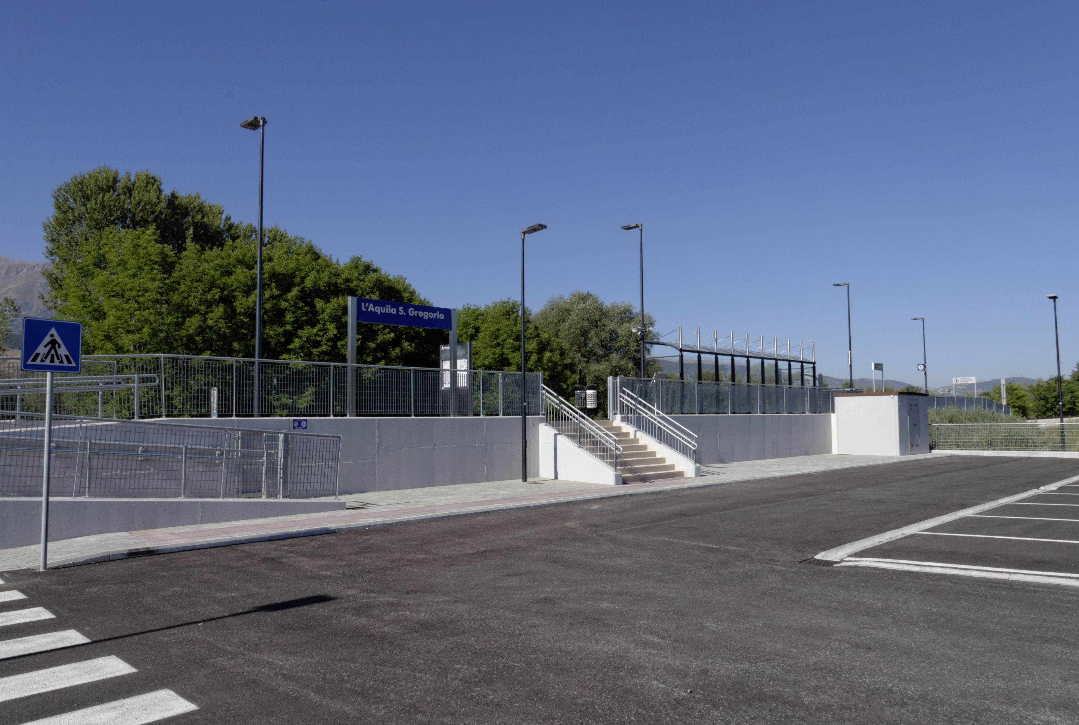 L'Aquila 2017 Dieses Foto entstand in Zusammenarbeit mit Stadtbesichtigungen.de Die Seiten Stadtbesichtigungen.de, der dazugehörige Reise Blog sowie die Facebookseite: Stadtbesichtigungen Rom dürfen dieses Bild für Ihre Veröffentlichungen ohne den Hinweis auf Wikipedia, Commons bzw der Lizenz verwenden. Die Verantwortlichen habe von mir (Ra Boe) die Originaldaten zur freien Verfügung übermittelt bekommen.